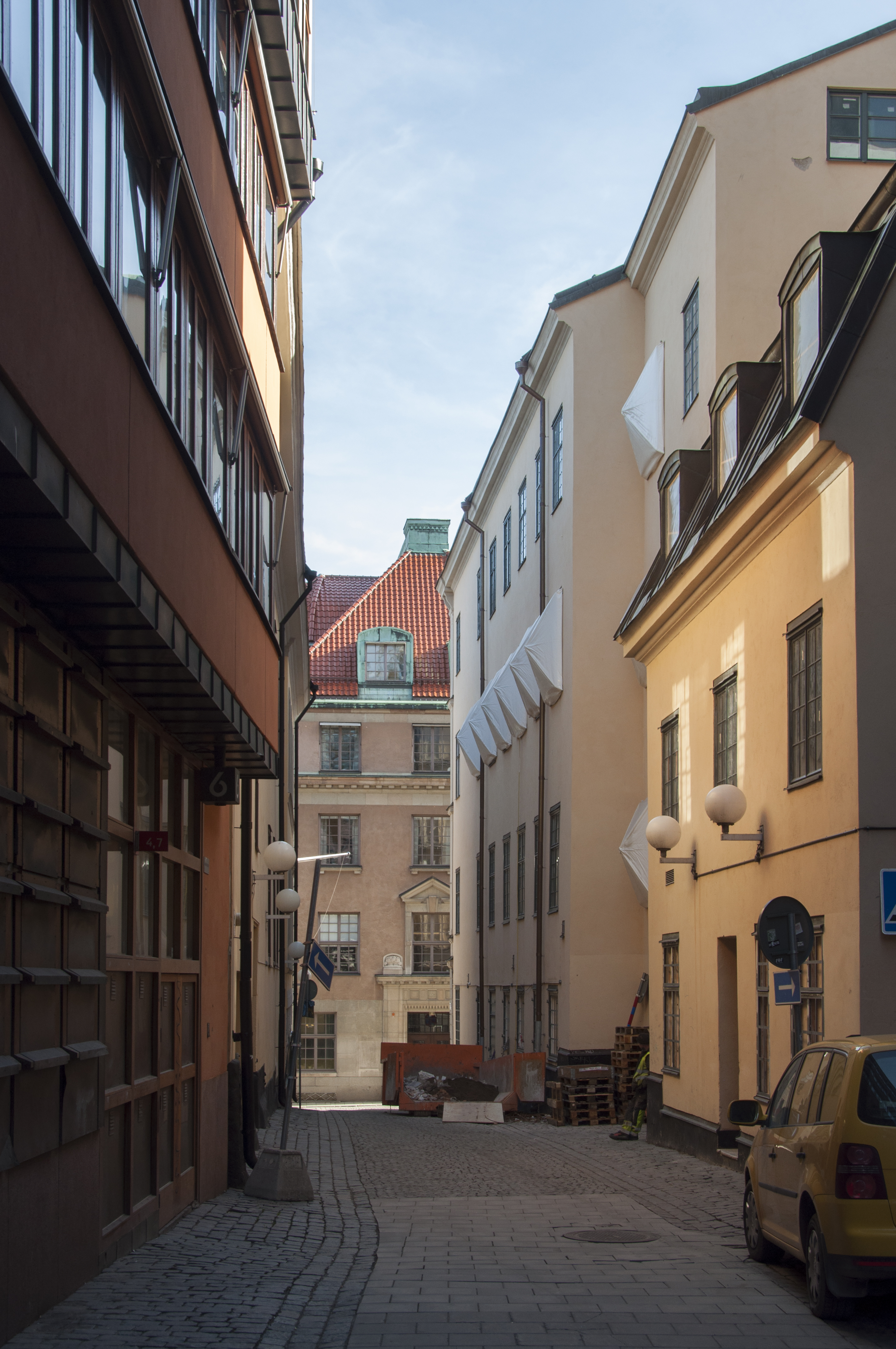 Kocksgränd österut